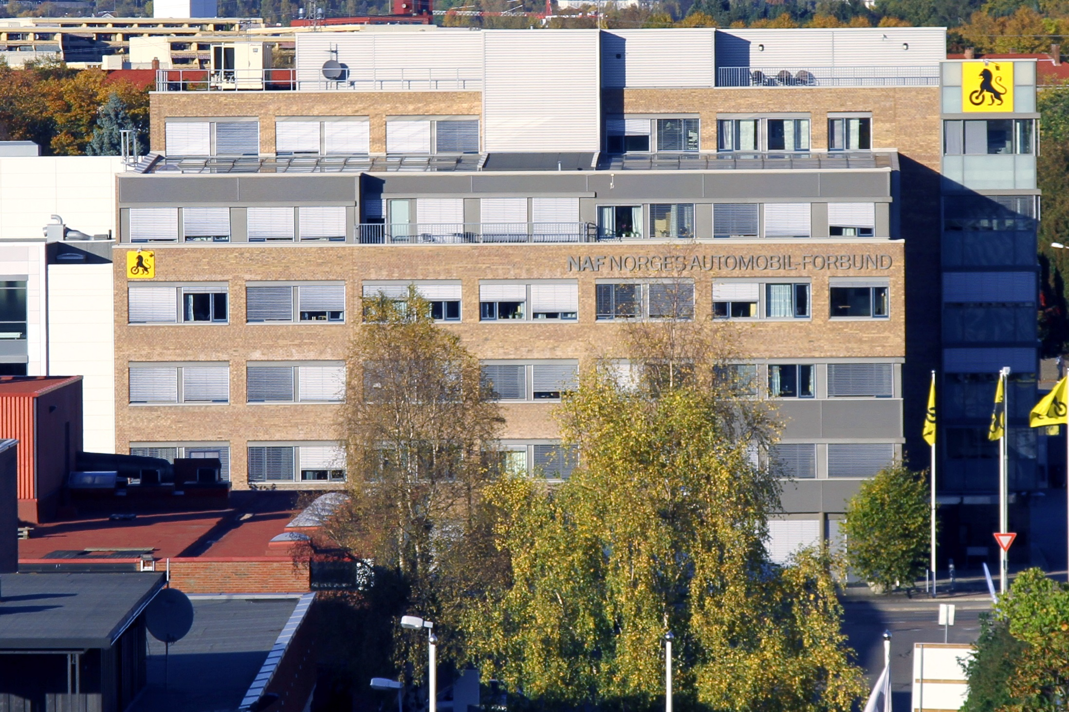 Norges Automobil-Forbund, Østensjøveien 14 i Oslo.